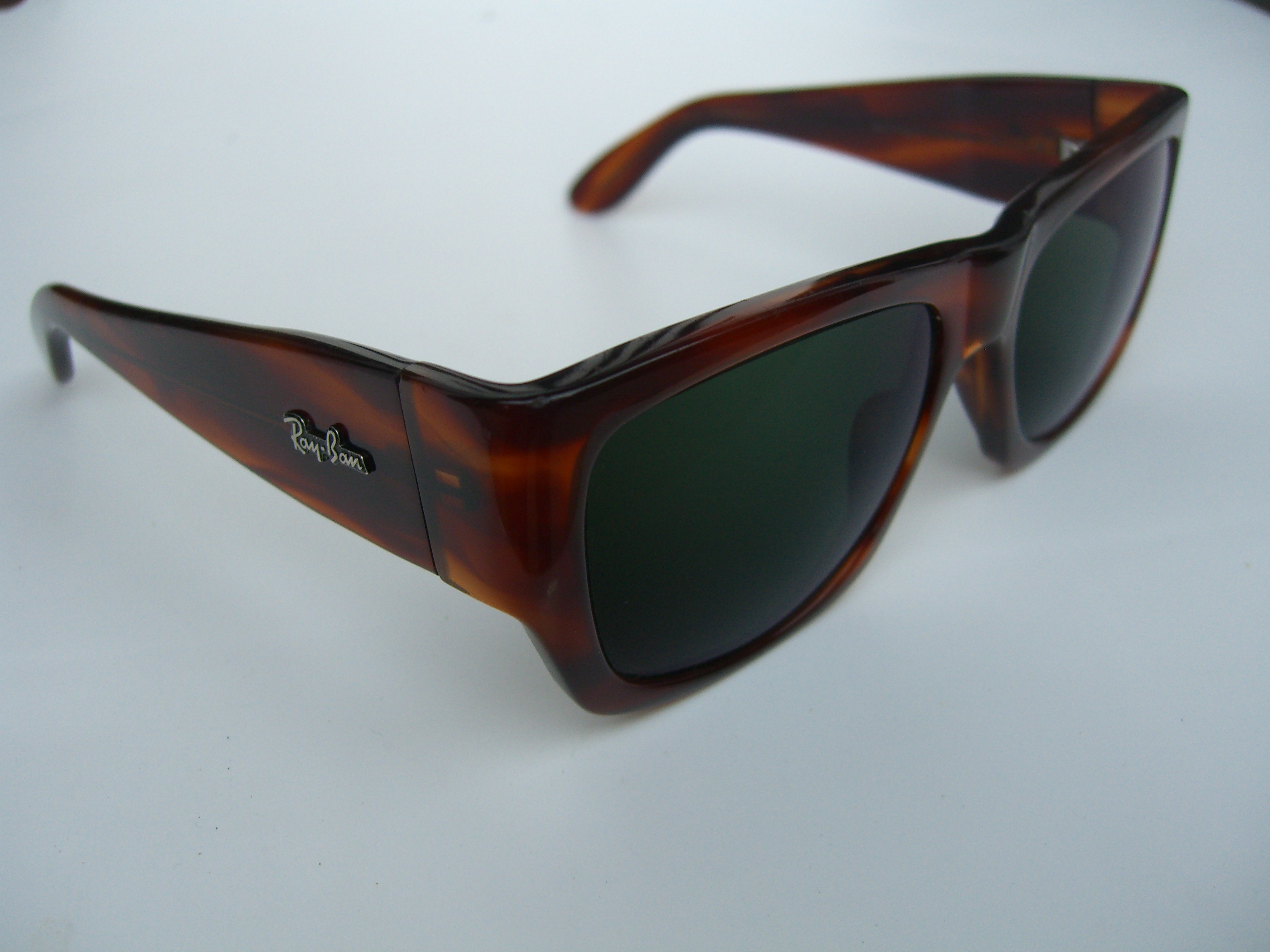 Sonnenbrille von Bausch & Lomb, Modell Ray-Ban "Wayfarer Nomad", made in USA